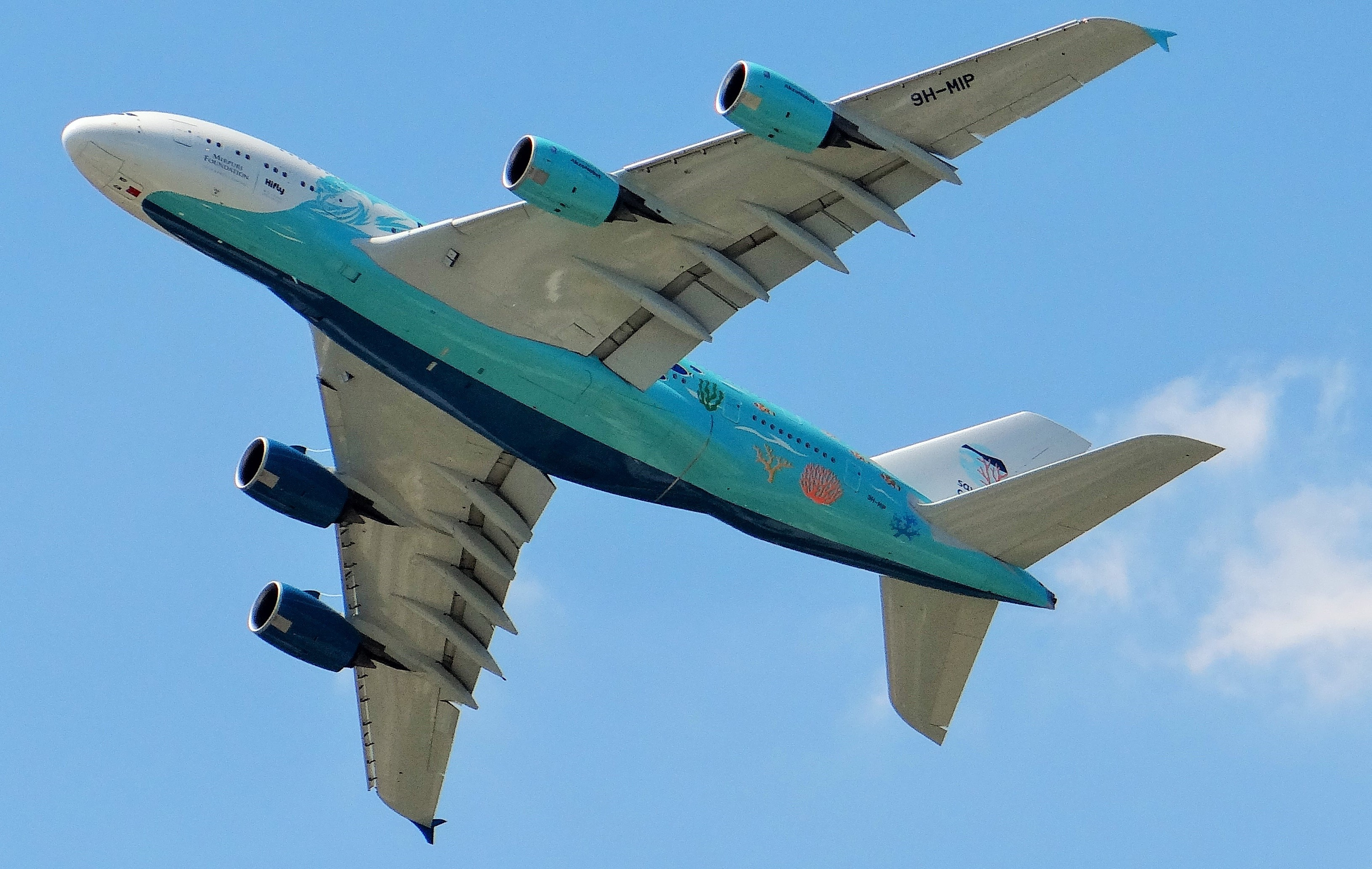 Airbus A380 9H-MIP, de la compagnie HiFly Malta en démonstration lors du Salon de Paris Le Bourget, juin 2019